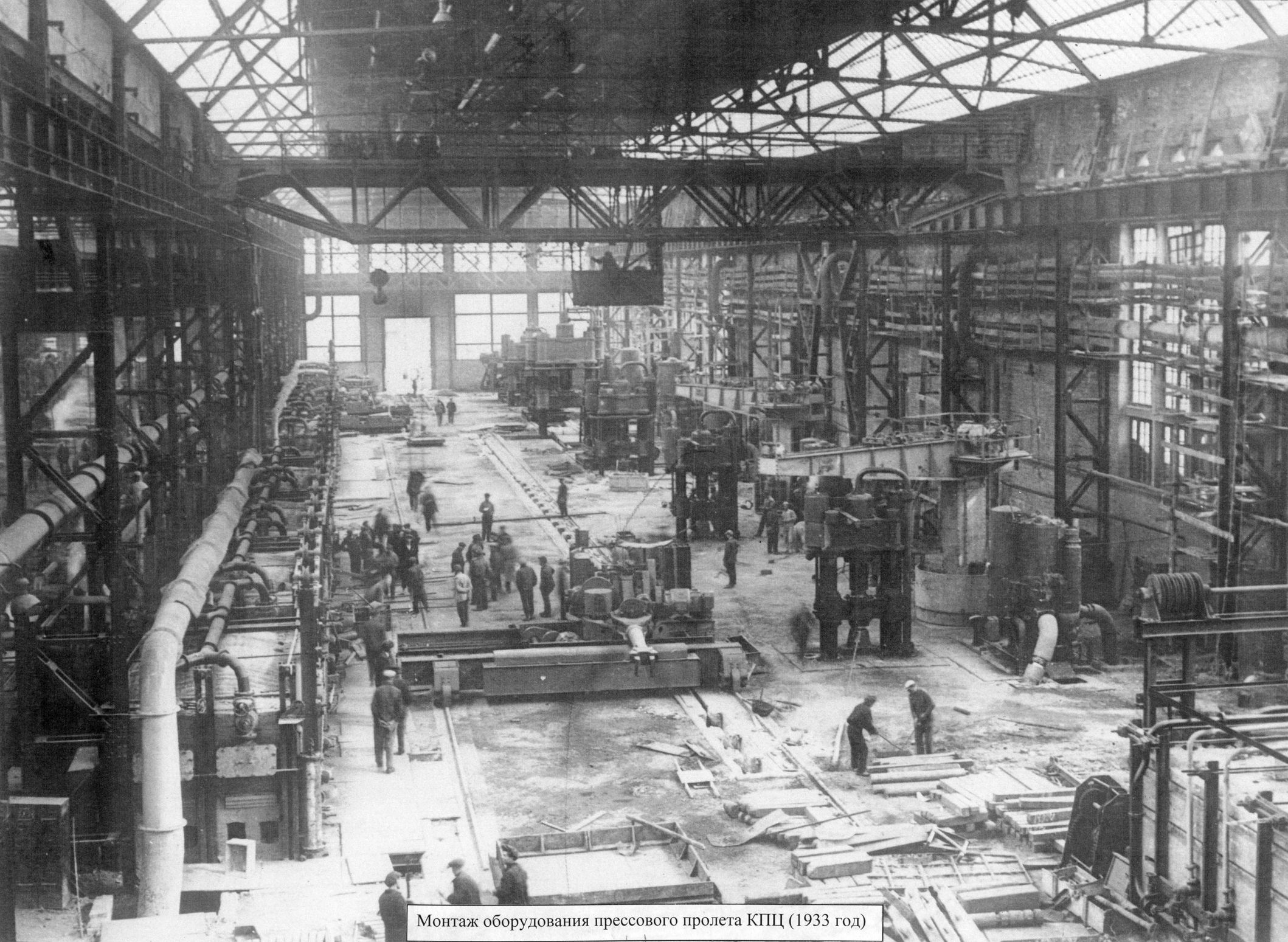 Монтаж оборудования прессового пролета КПЦ /кузнечно-прессового цеха/. Луганск, Украина. 1933 год.